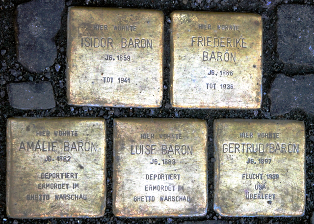 Beschreibung/Description: Braunschweig: „Stolperstein“. Brunswick, Germany: Art project “Stolperstein” (stumbling block).